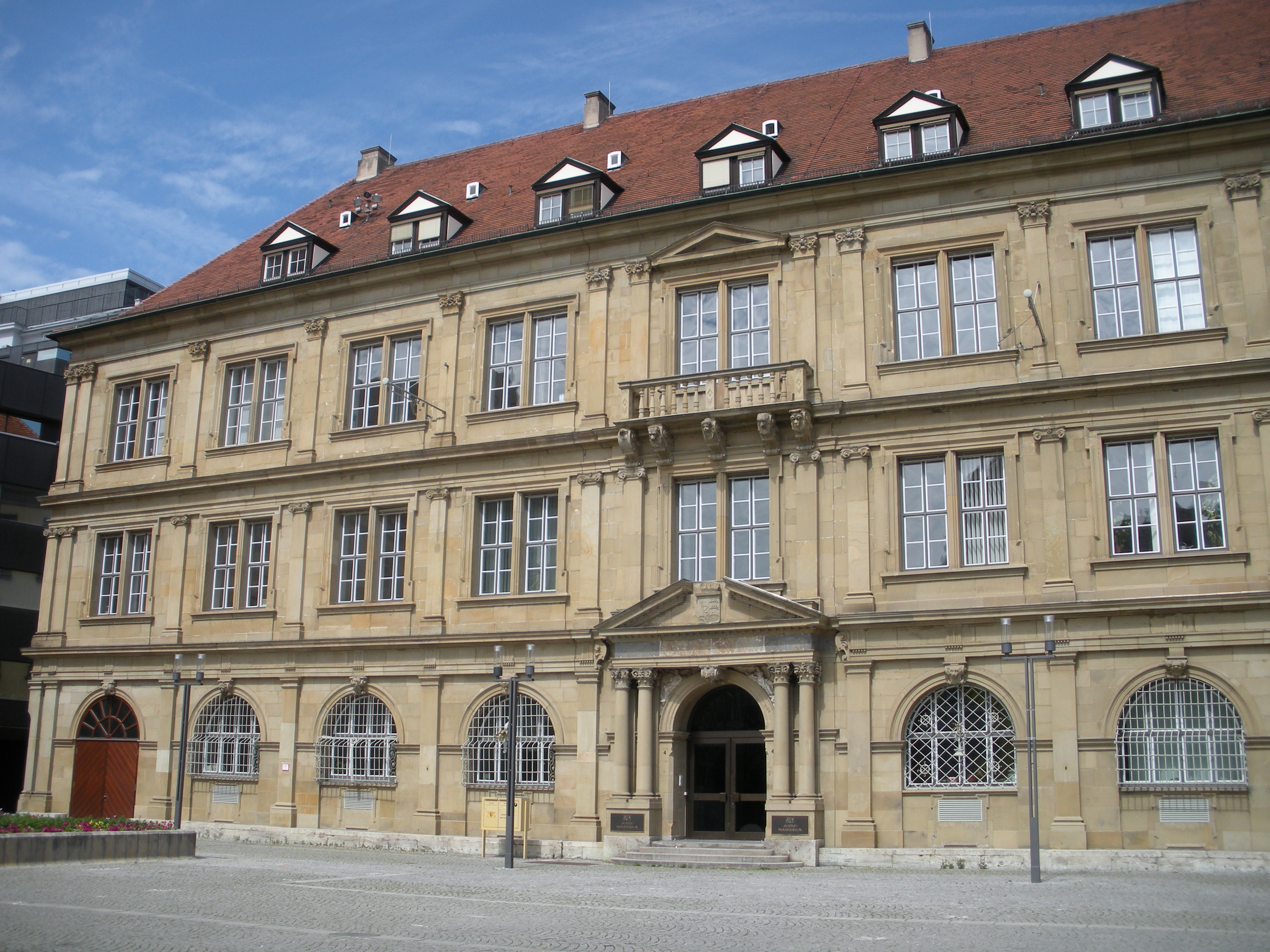 Justizministerium Baden-Württemberg in Stuttgart, Schillerplatz